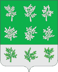 Герб Богородицкого района Тульской области